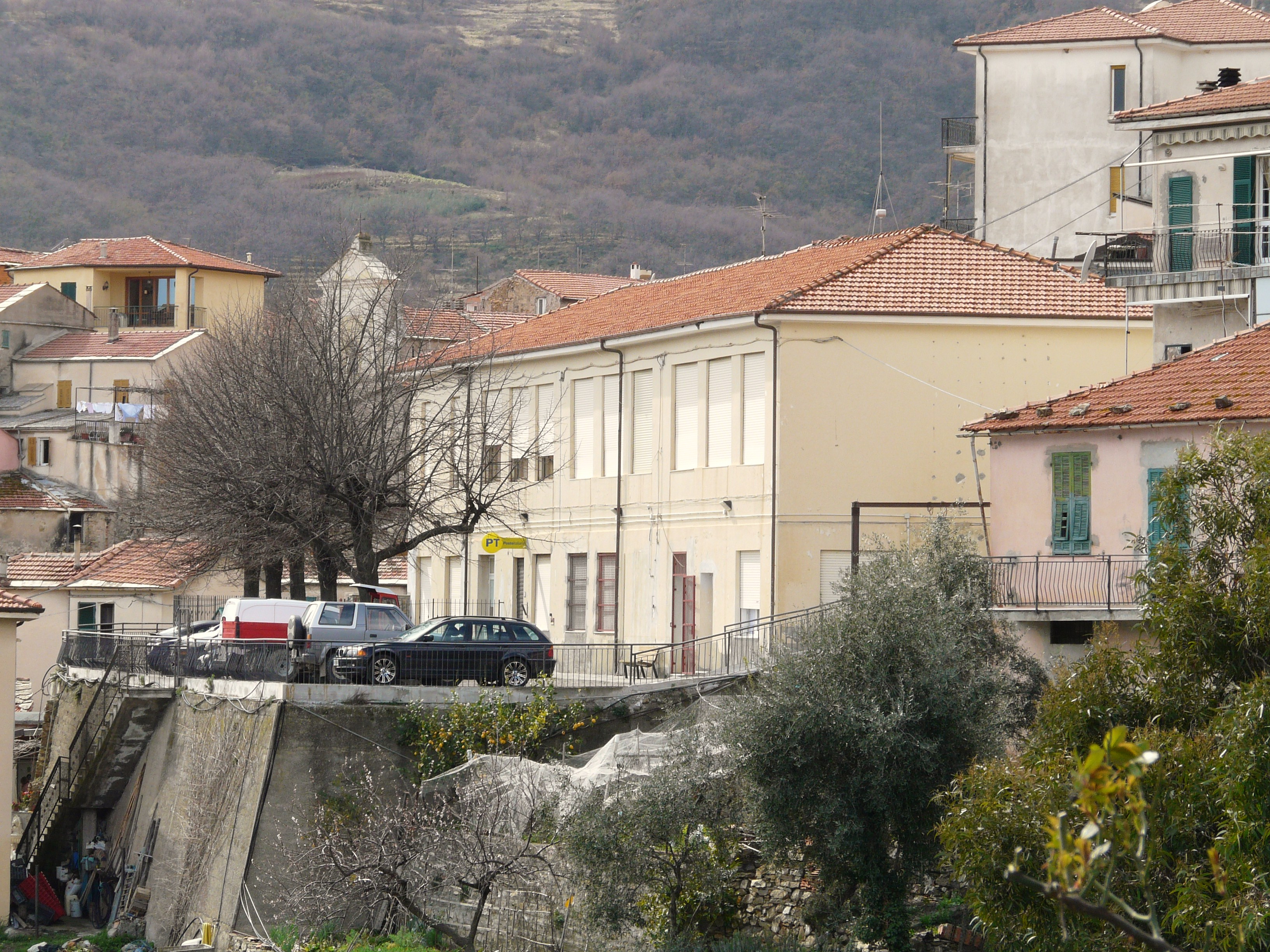 Municipio, Pietrabruna, Liguria, Italia